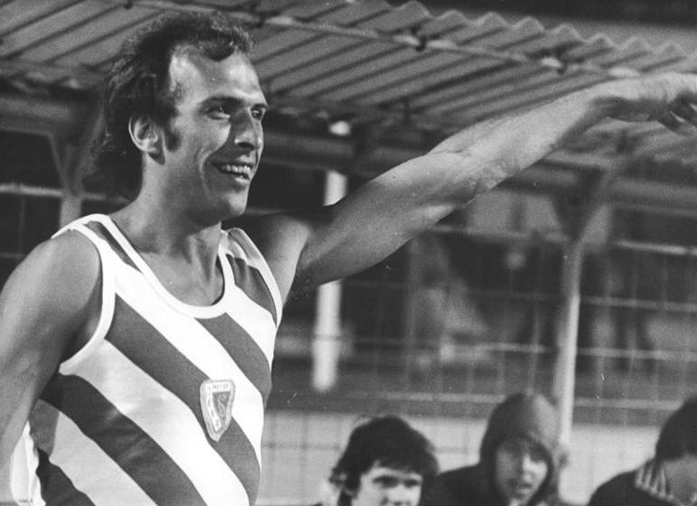 Rolf Beilschmidt ADN-ZB Kluge 2.7.78 Leipzig: 29. DDR-Meisterschaften der Leichtathletik. Rolf Beilschmidt (SC Motor Jena) sorgte am Abend des 1.7. mit 2,31 m im Hochsprung für einen Höhepunkt dieser Titelkämpfe. Erst nach hartem Kampf mit dem Erfurter Henry Lauterbach (2,28 m) erreichte Beilschmidt diese Höhe und stellte damit seinen eigenen DDR-Rekord ein. Rolf Beilschmidt